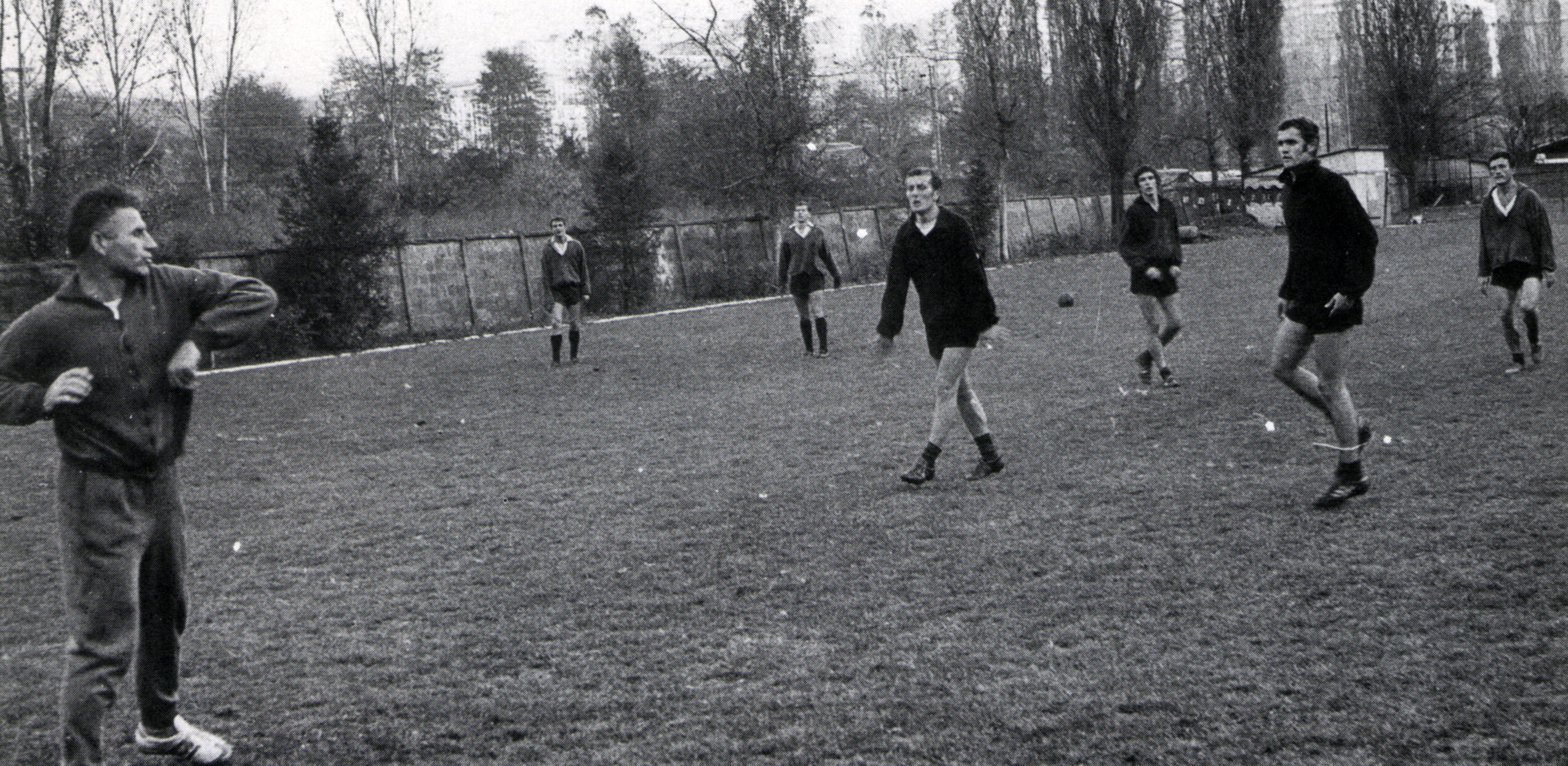 Српски (ћирилица): Марко Валок води тренинг